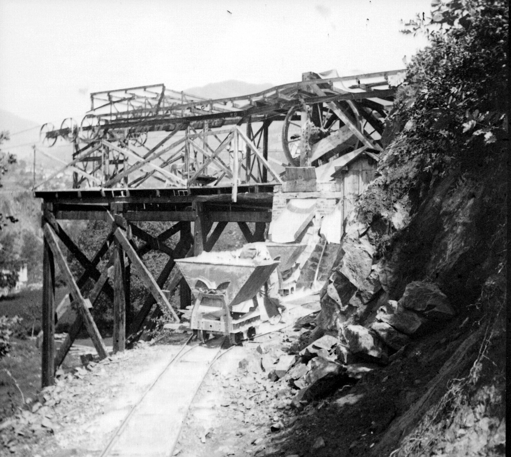 Cropped from Image:Usine, Luzenac.jpg Fonds Trutat - Photographie ancienne Cote : TRU C 433 Localisation : Fonds ancien Original non communicable Titre : Usine, Luzenac Auteur : Trutat, Eugène Rôle de l’auteur : Photographe Lieu de création : Luzenac (Ariège) Date de création : : 19e siècle, 4e quart Mesures : 11 x 5 cm Mot(s)-clé(s) : -- Usine -- Rail -- Wagonnet -- Ferraille -- Roue -- Luzenac (Ariège) -- Cabannes, Les (Ariège ; canton) -- Ariège (France ; haute vallée) -- Pyrénées (France) -- 19e siècle, 4e quart Médium : Photographies Médium : Positifs sur plaque de verre -- Noir et blanc -- Stéréogrammes -- Paysages industriels Voir : TRU C 2536 Usine, ferraille, Luzenac Bibliothèque de Toulouse. Domaine public